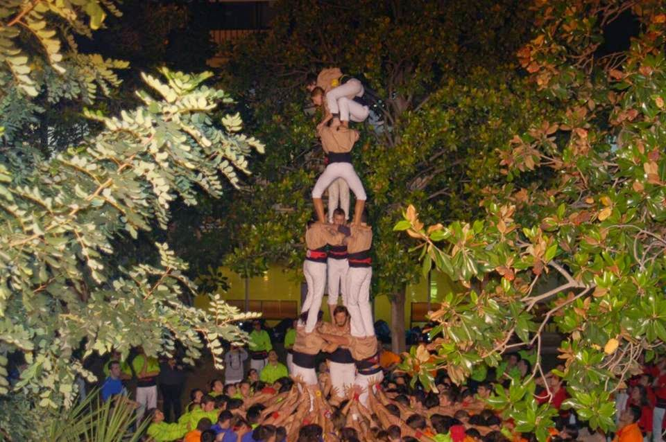 3 de 6 dels Trempats a Vilanova. Primer castell de la seva història.